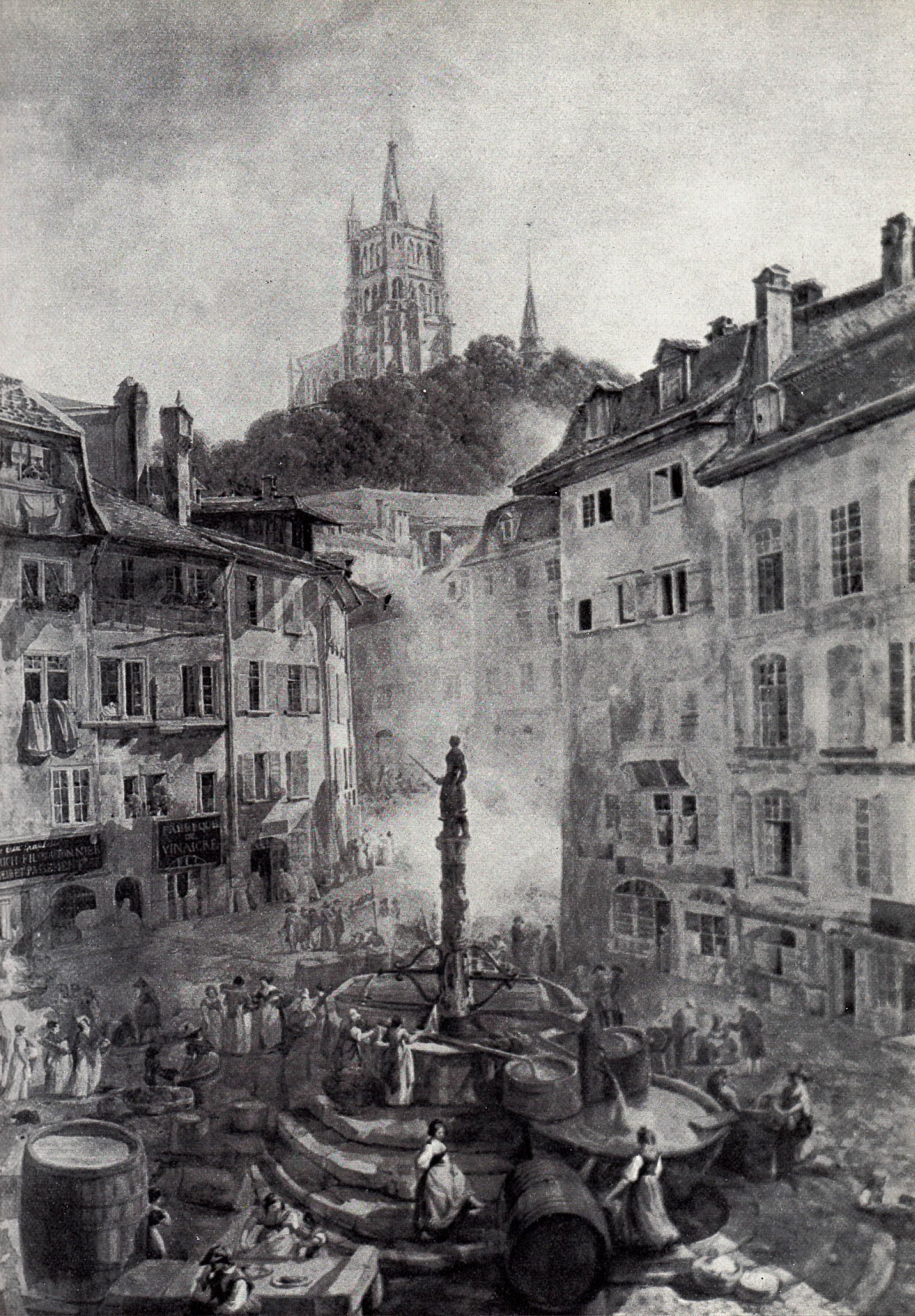 Brunnen auf der Place de la Palud in Lausanne, um 1800.